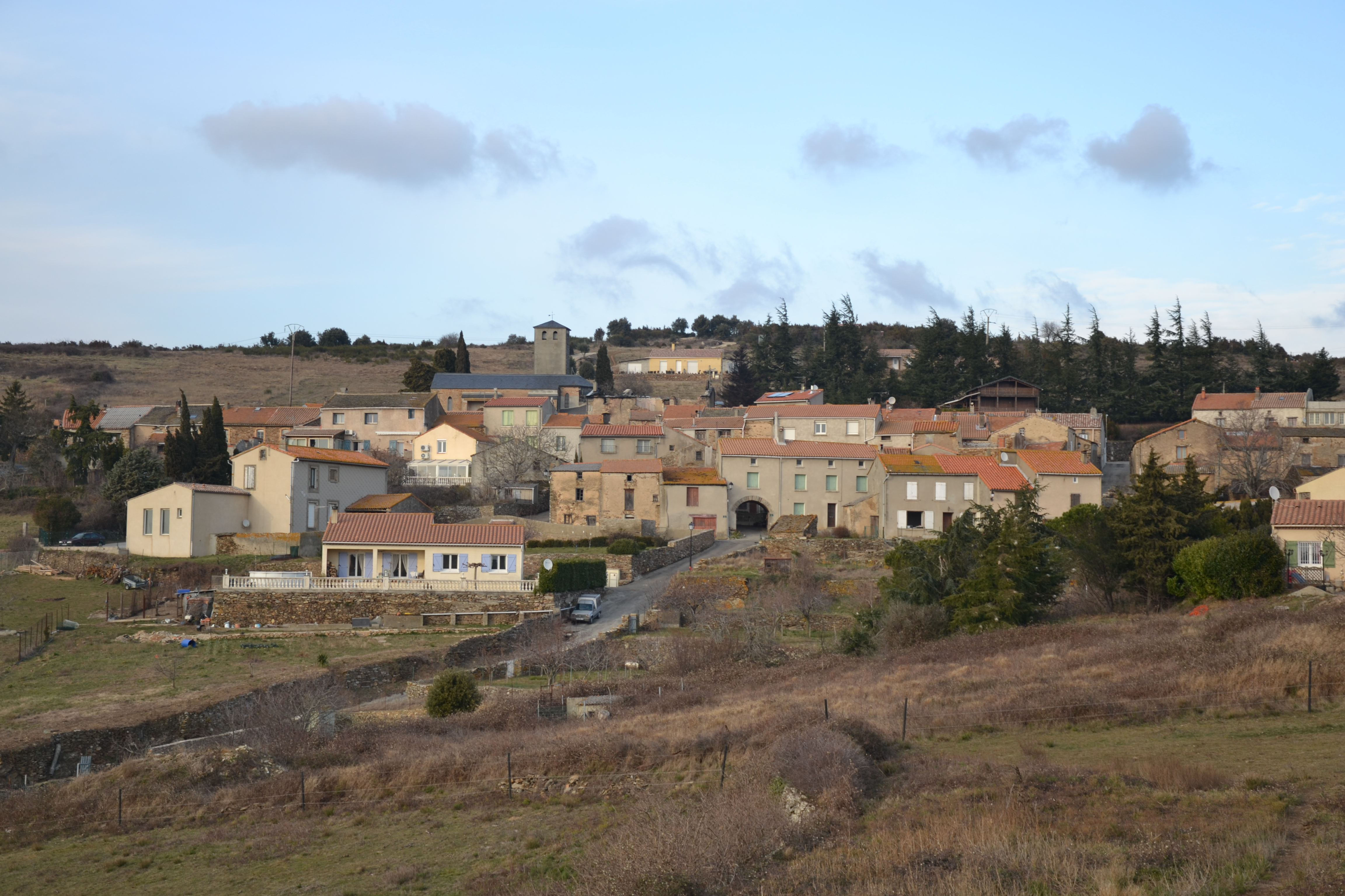 Vue générale du village